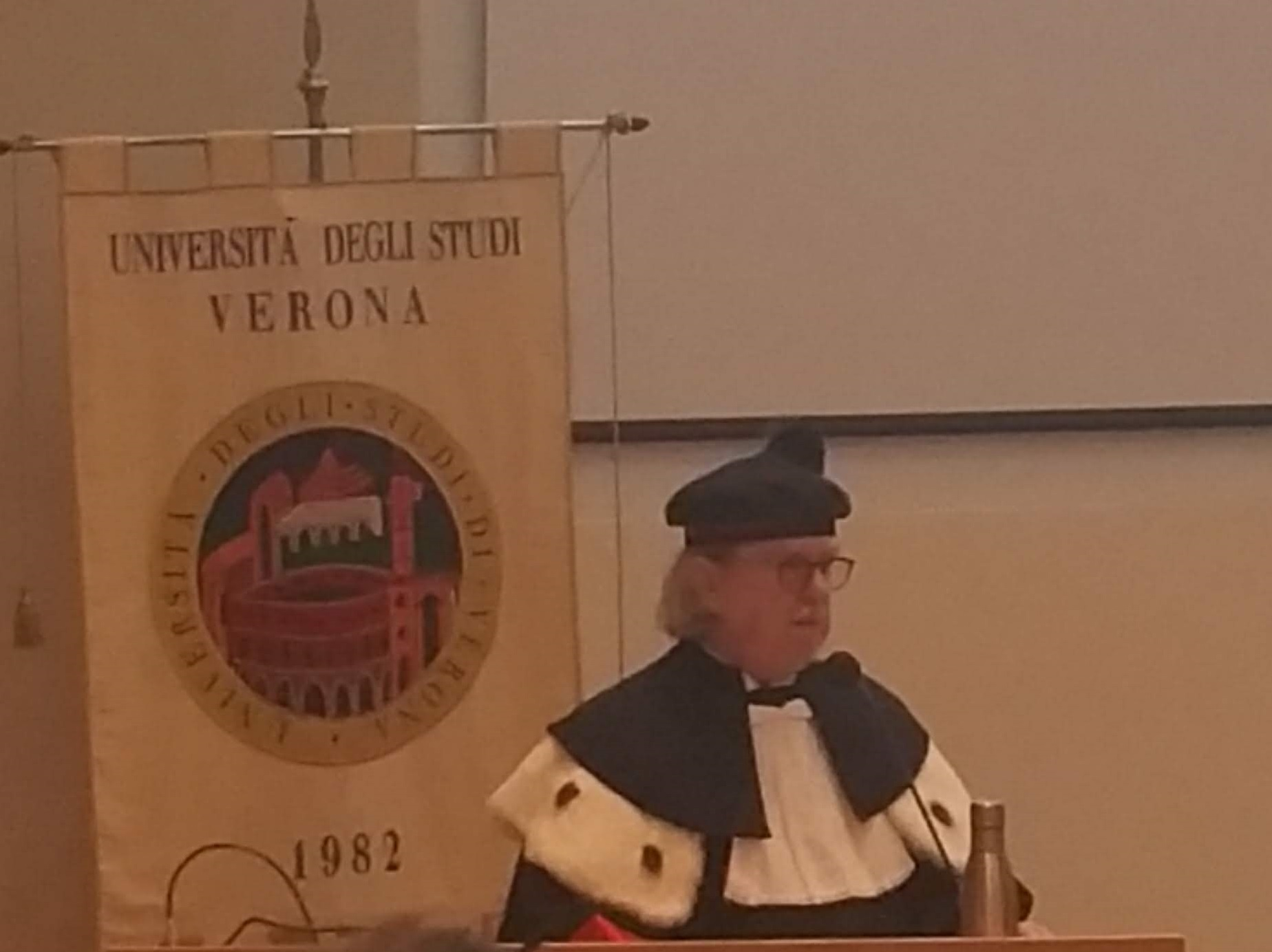 Foto cerimonia laurea honoris causa James Patrick Allison Università di Verona